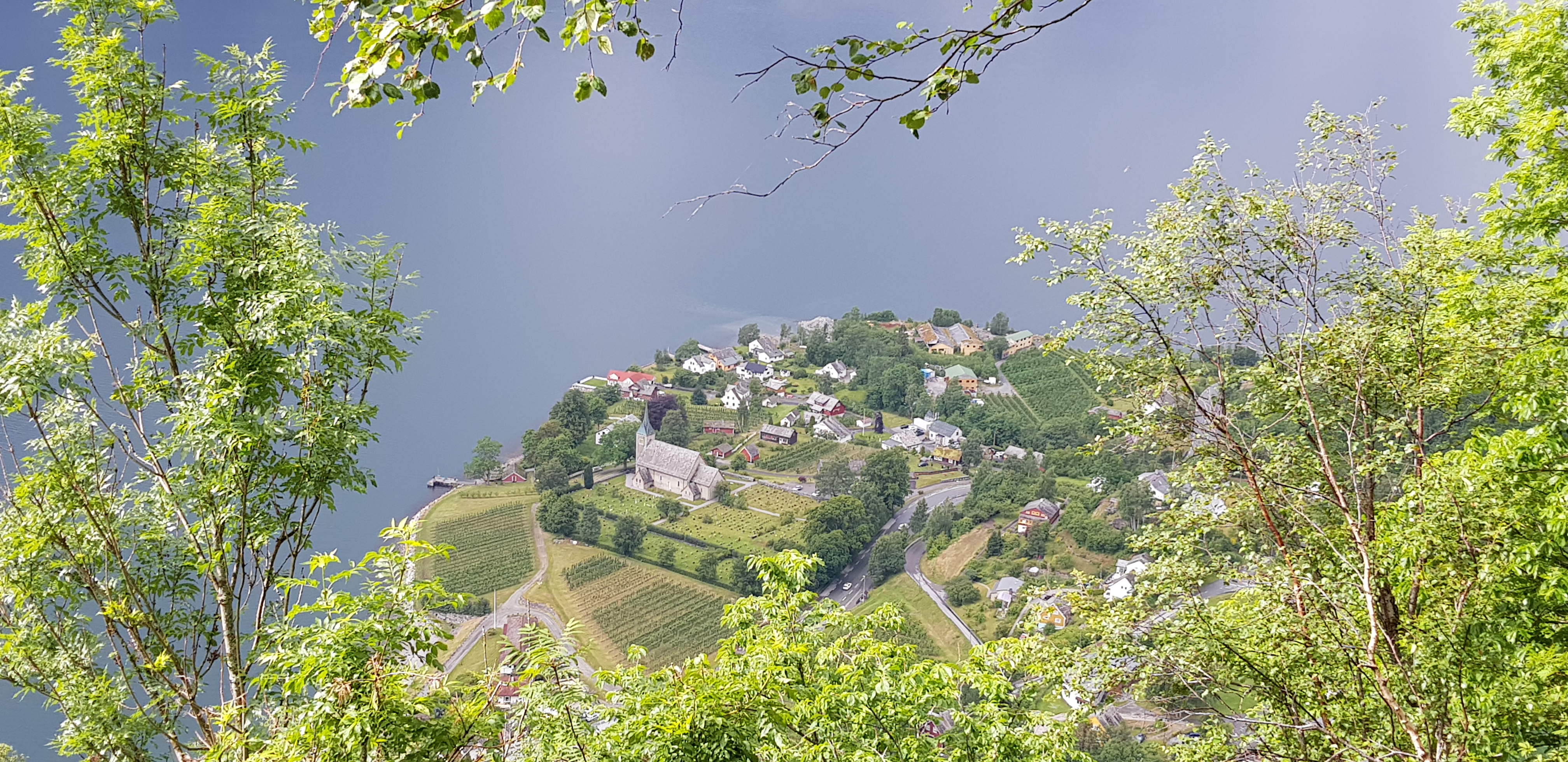 Ullensvang kirke ligger sør for Lofthus sentrum. (Foto: Joar Øygard).